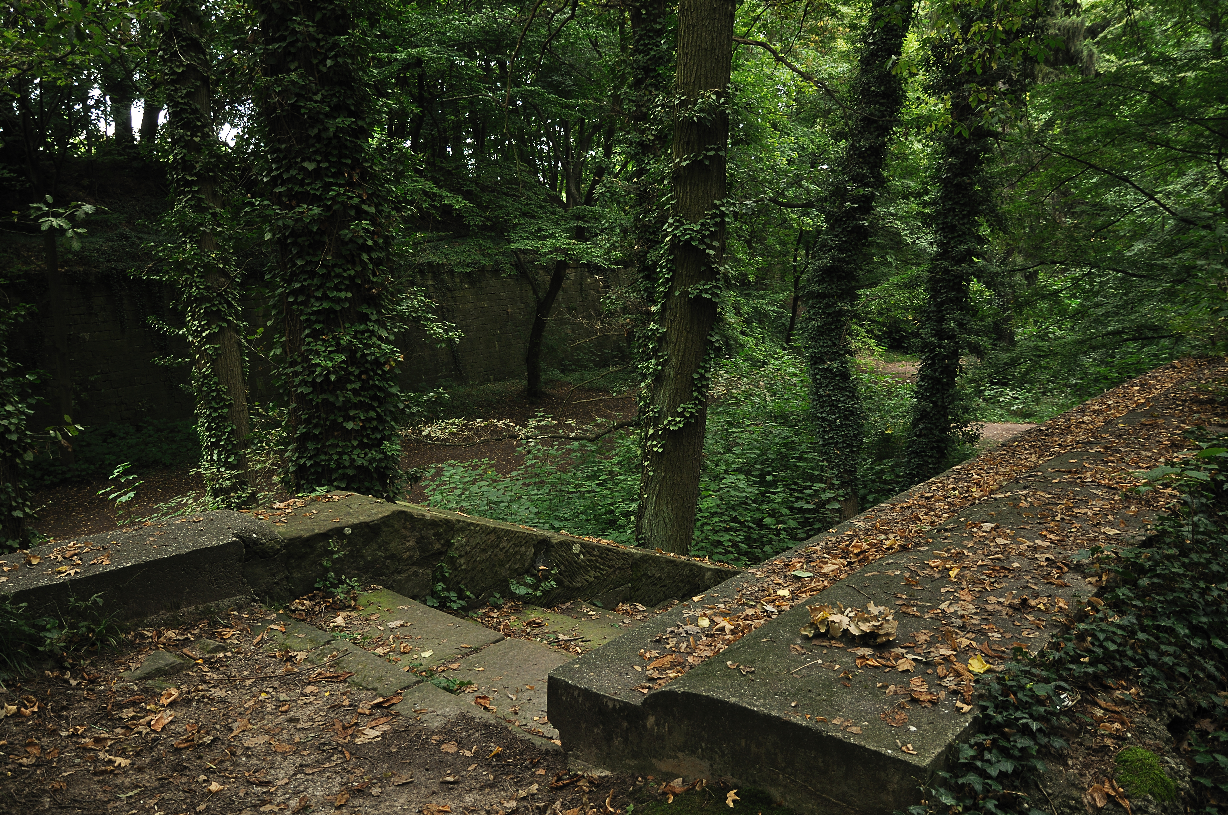 Festung Landau, Pfalz